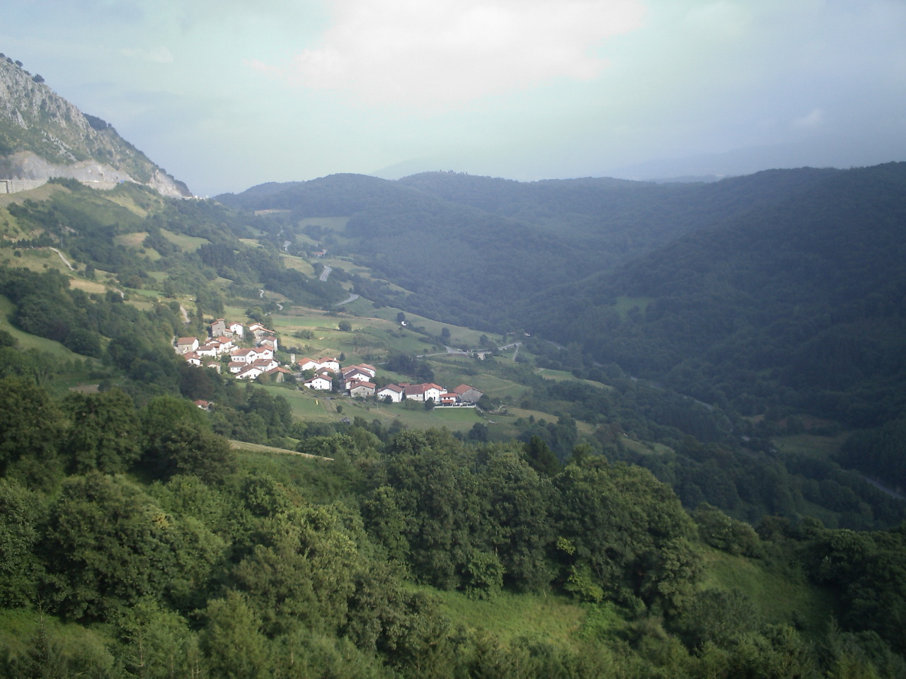 Azpiroz - Navarra (Spain)